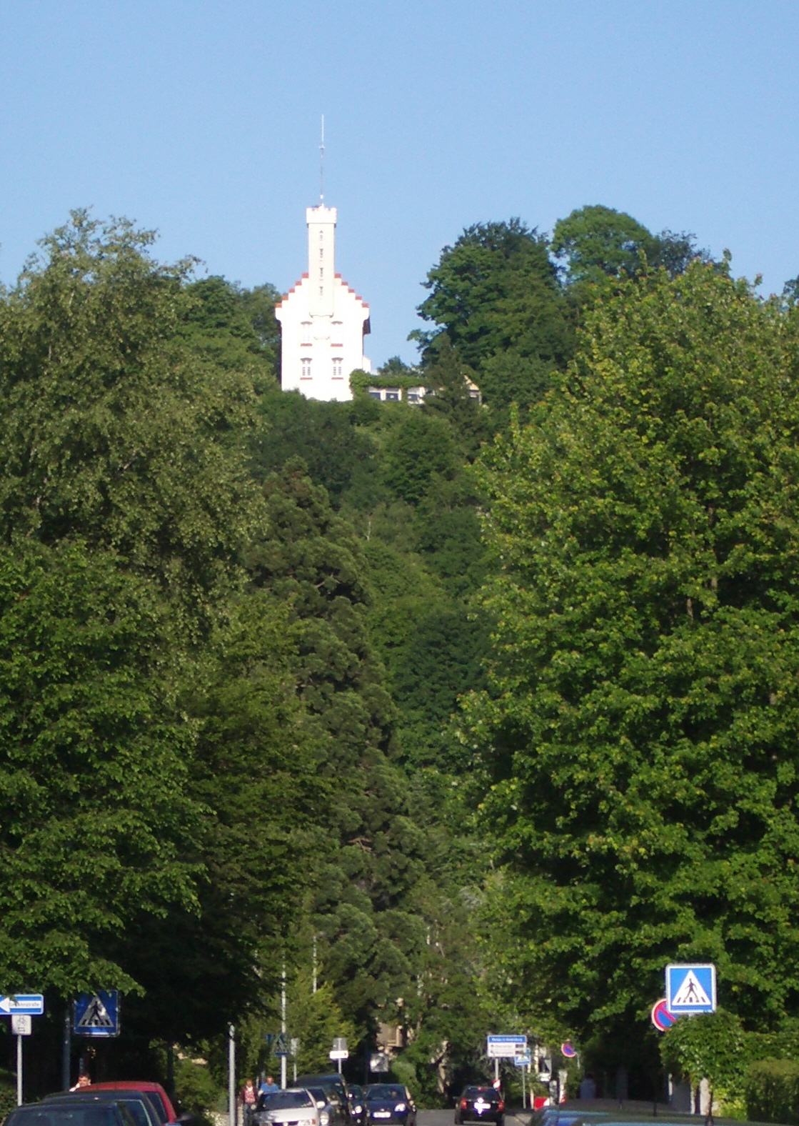 Ravensburg: Veitsburg-Schlösschen, Ansicht von der Rudolfstraße